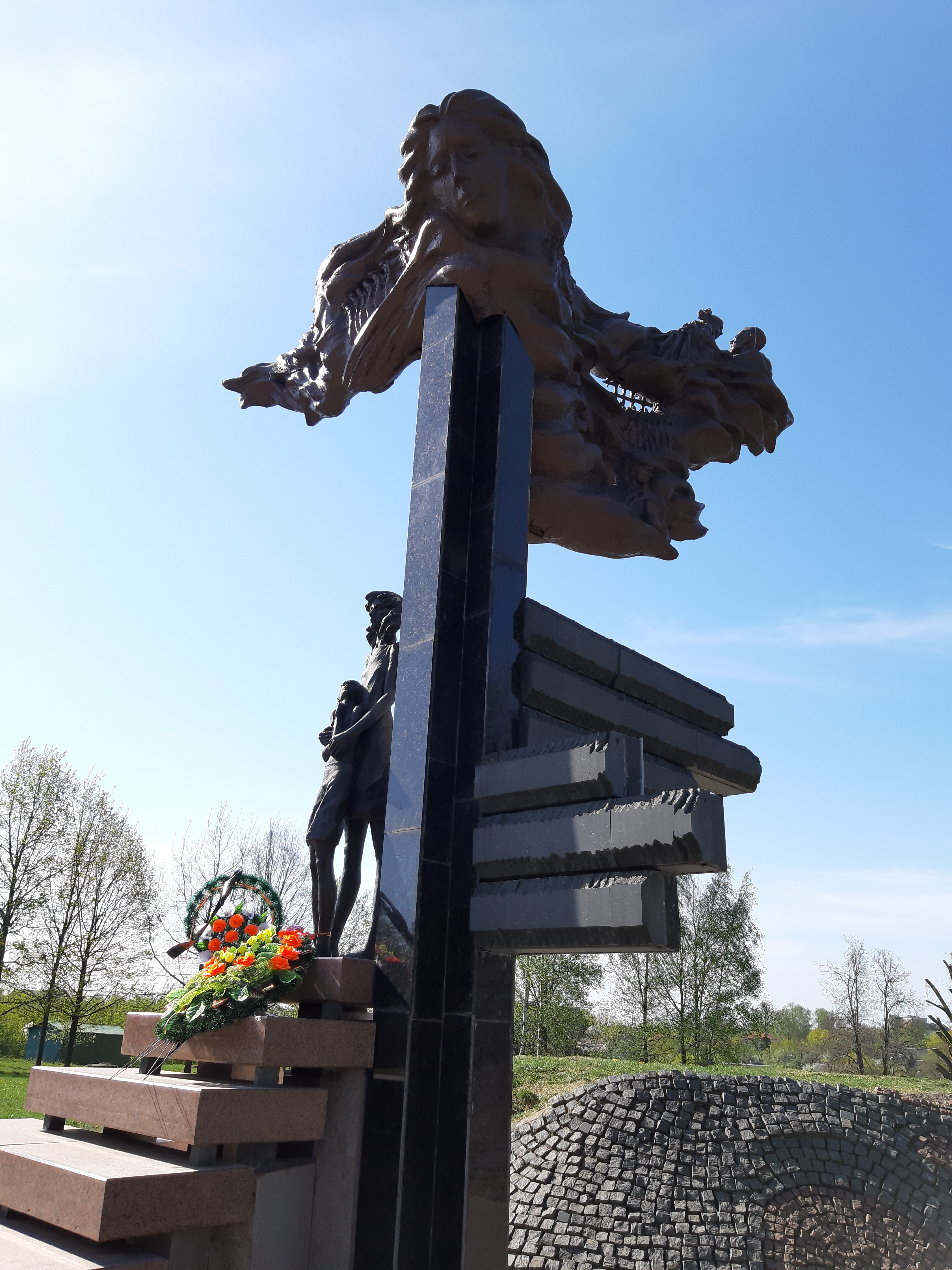 Магілёў. Дзеці міру — дзецям вайны